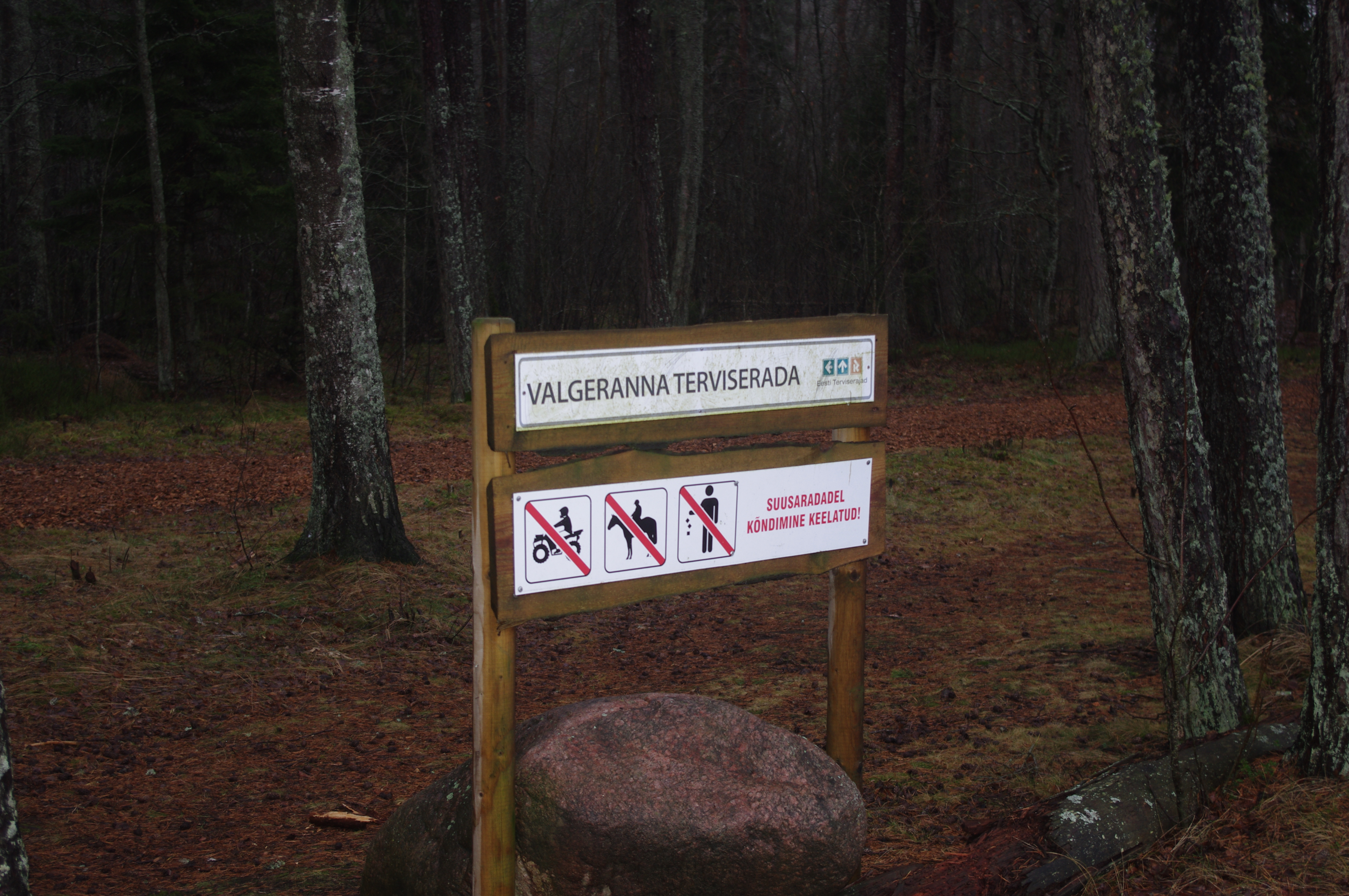 Valgeranna terviserada